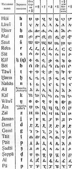 no original description